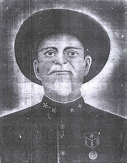 Amador Liens Cabrera